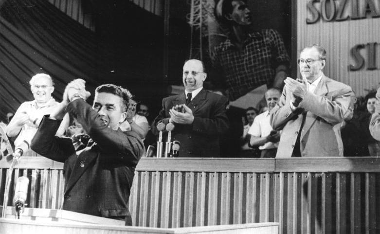 Zentralbild Ulmer 13.7.1958. V. Parteitag der SED vom 10. bis 16.7.1958 in der Werner-Seelenbinder-Halle, Berlin. 4. Tag. UBz.: Starker Beifall zum Abschluss der Begrüssungsansprache von William Alexander, Mitglied des Politbüros der Kommunistischen Partei Britanniens. Rechts: Ministerpräsident Otto Grotewohl, Mitglied des Politbüros von der ZK der SED, und Walter Ulbricht, Erster Sekretär des ZK der SED.